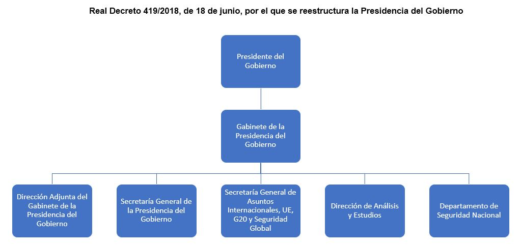 Organigrama Gabinete Presidencia